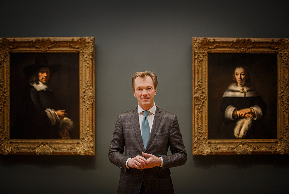 Wim Pijbes tijdens tentoonstelling Rembrandt, the Late Works. Op de achtergrond: portret van een heer met hoed en handschoenen, en portret van een dame met struisvogelveer, beide van Rembrandt, uit de National Gallery of Art, Washington